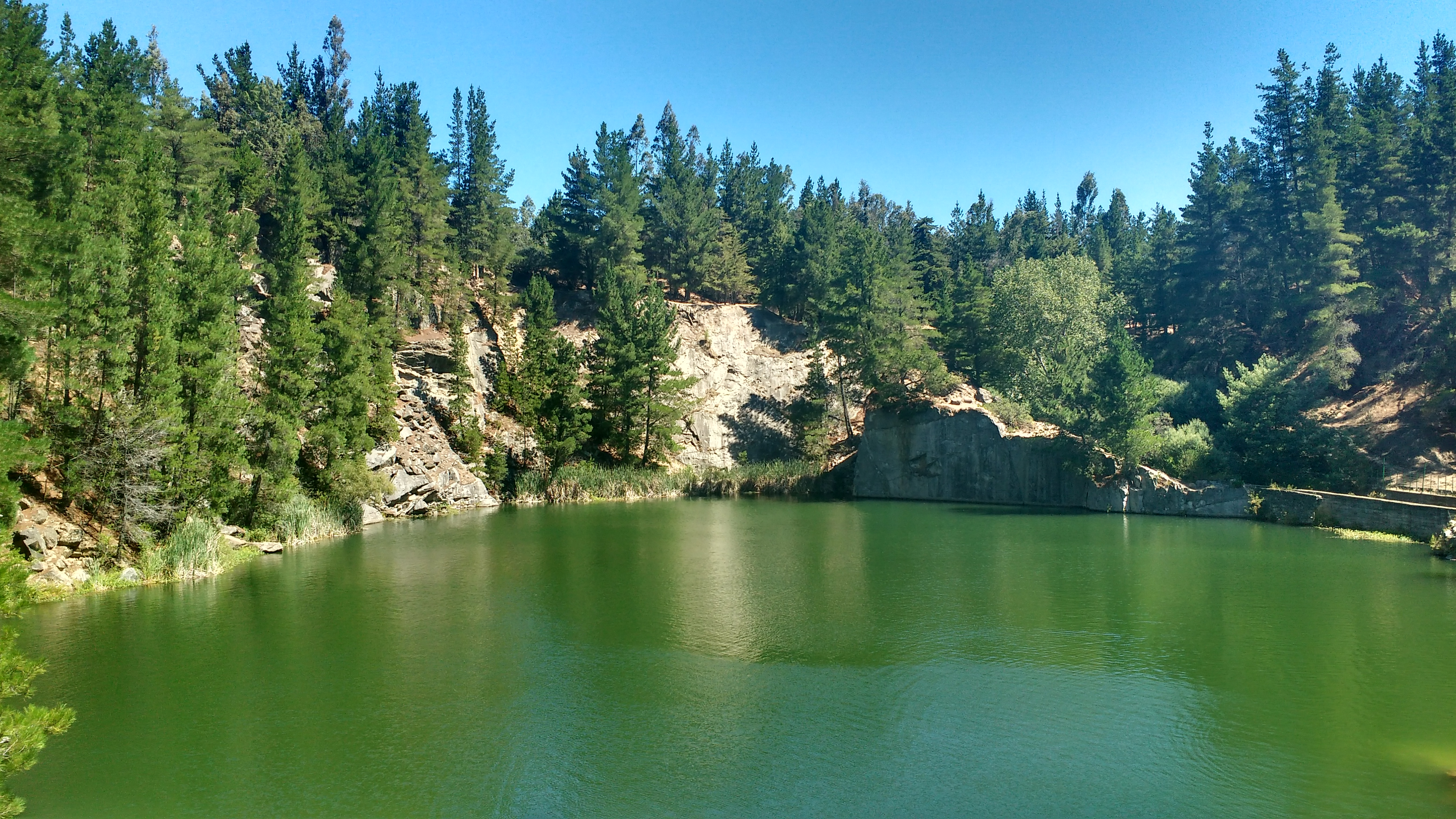 Vista hacia la laguna de las canteras de Deuco ubicada en la comuna de Angol, Chile.